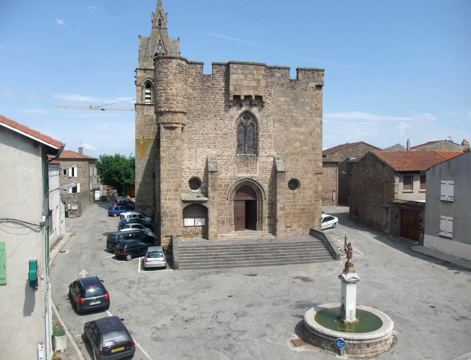 Quintenas église façade